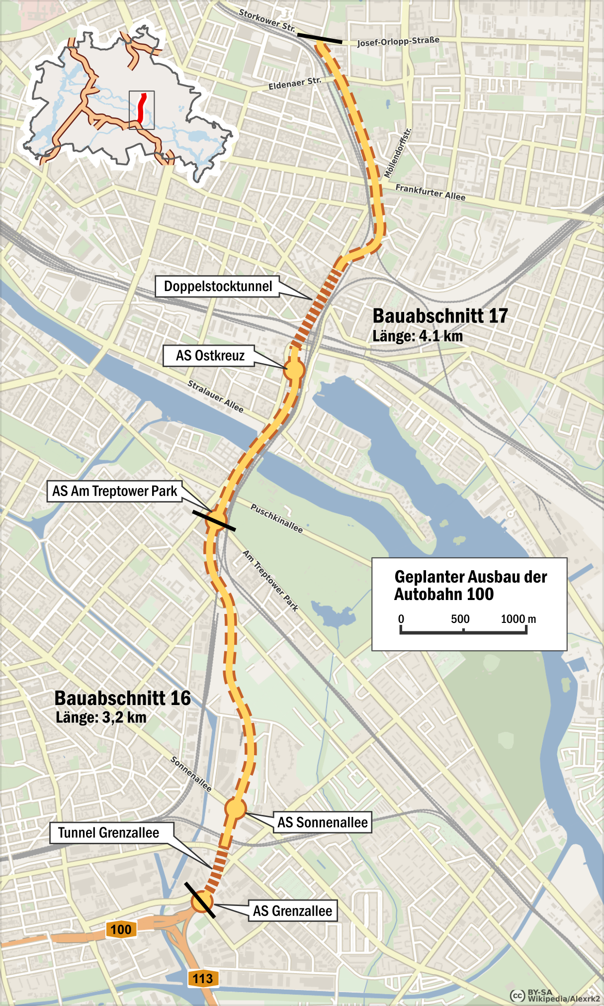 Geplanter Ausbau der Bundesautobahn 100: Bauabschnitt 16 und 17